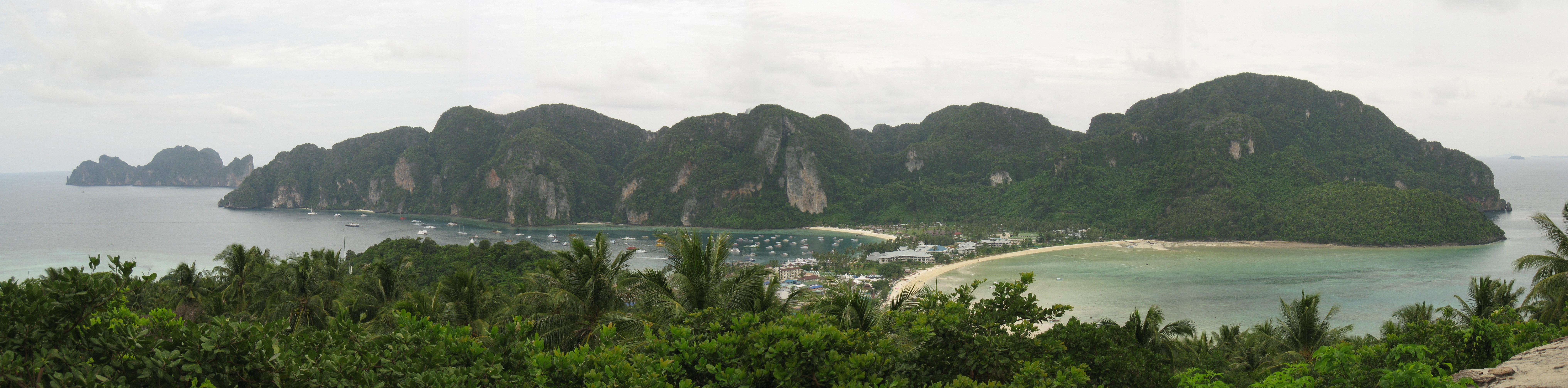 Panoramablick über Ko Phi Phi